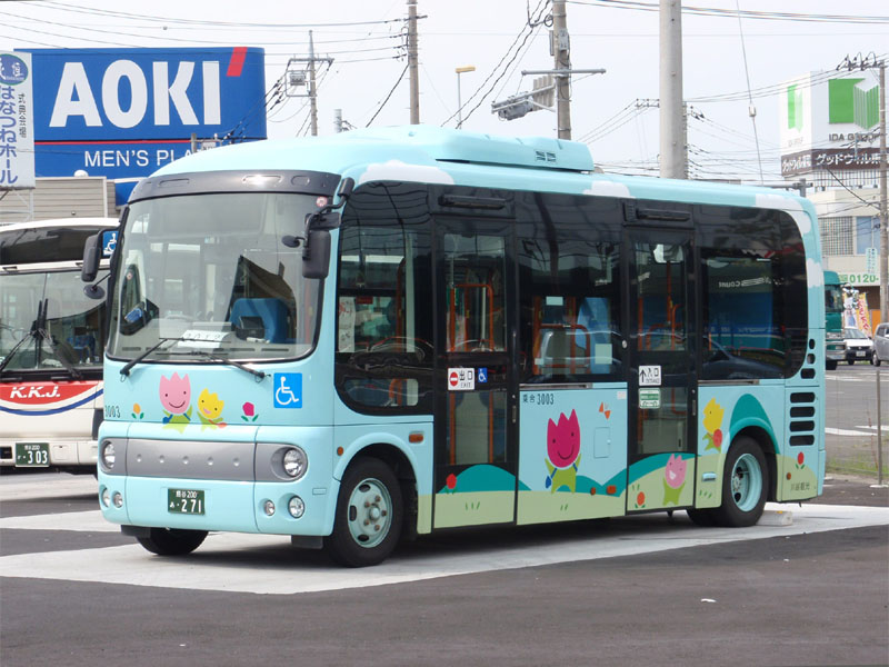 東松山市内循環バス（チューリップバス）日野ポンチョ BDG-HX6JLAE